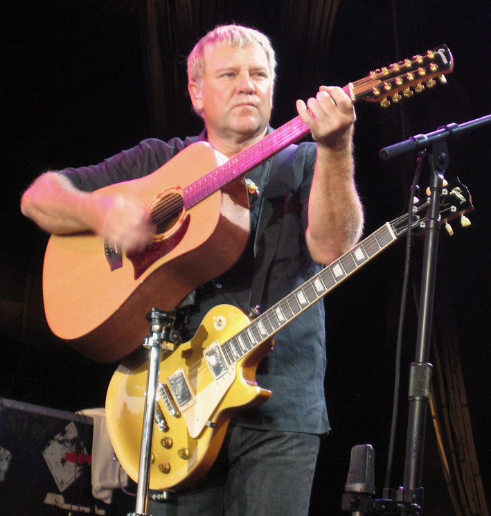 Alex Lifeson equipments (from Rush equipment): Garrison G25-12-E Gibson 1957 Les Paul Goldtop Reissue